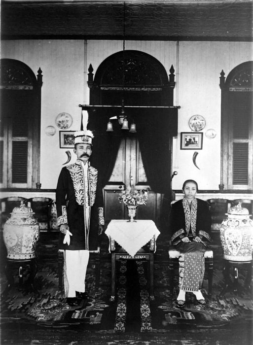 Repronegatief. Sultan Maulana Muh. Djalaluddin van Bulungan/Boeloengan (1930-1958). (vgl foto 902-3497 Nationaal Archief). De sultan van Bulungan en zijn echtgenote, Borneo